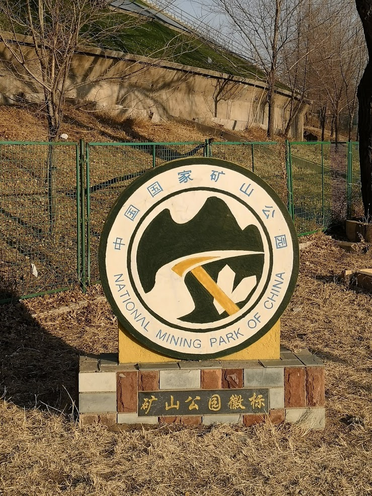 中文（中国大陆）: 位于海州露天矿国家矿山公园